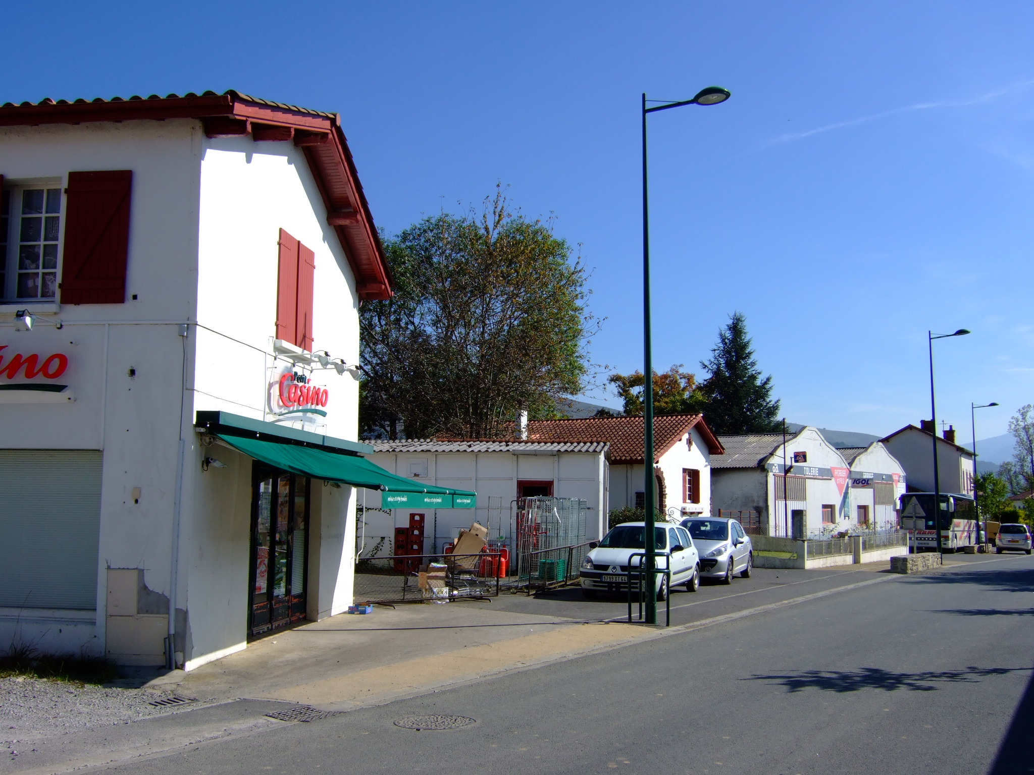 Larceveau